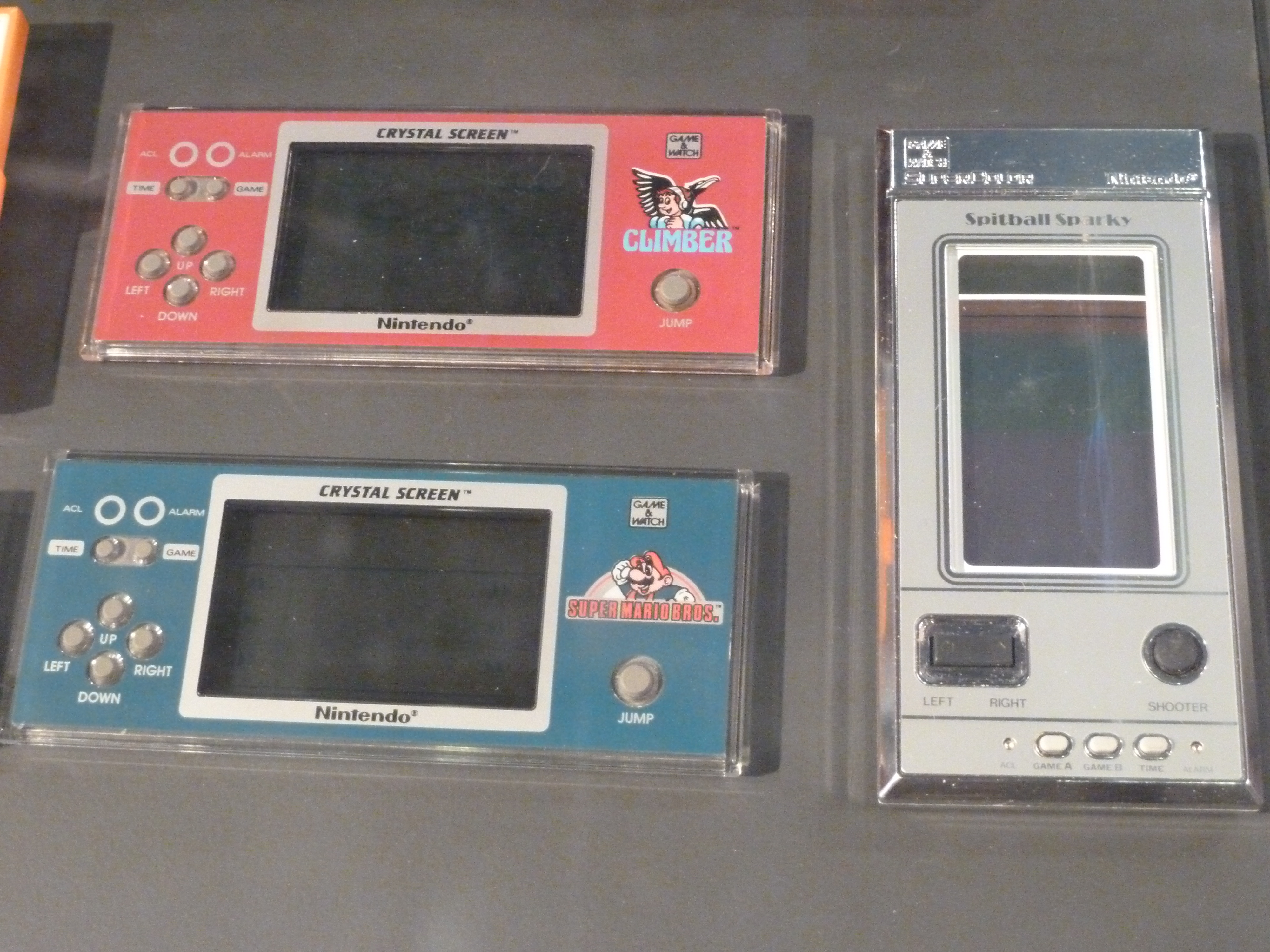 Consoles Game & Watch "Climber", "Super Mario Bros." et "Spitball Sparky" présentées au Festival du Jeu Vidéo par le musée du jeu vidéo